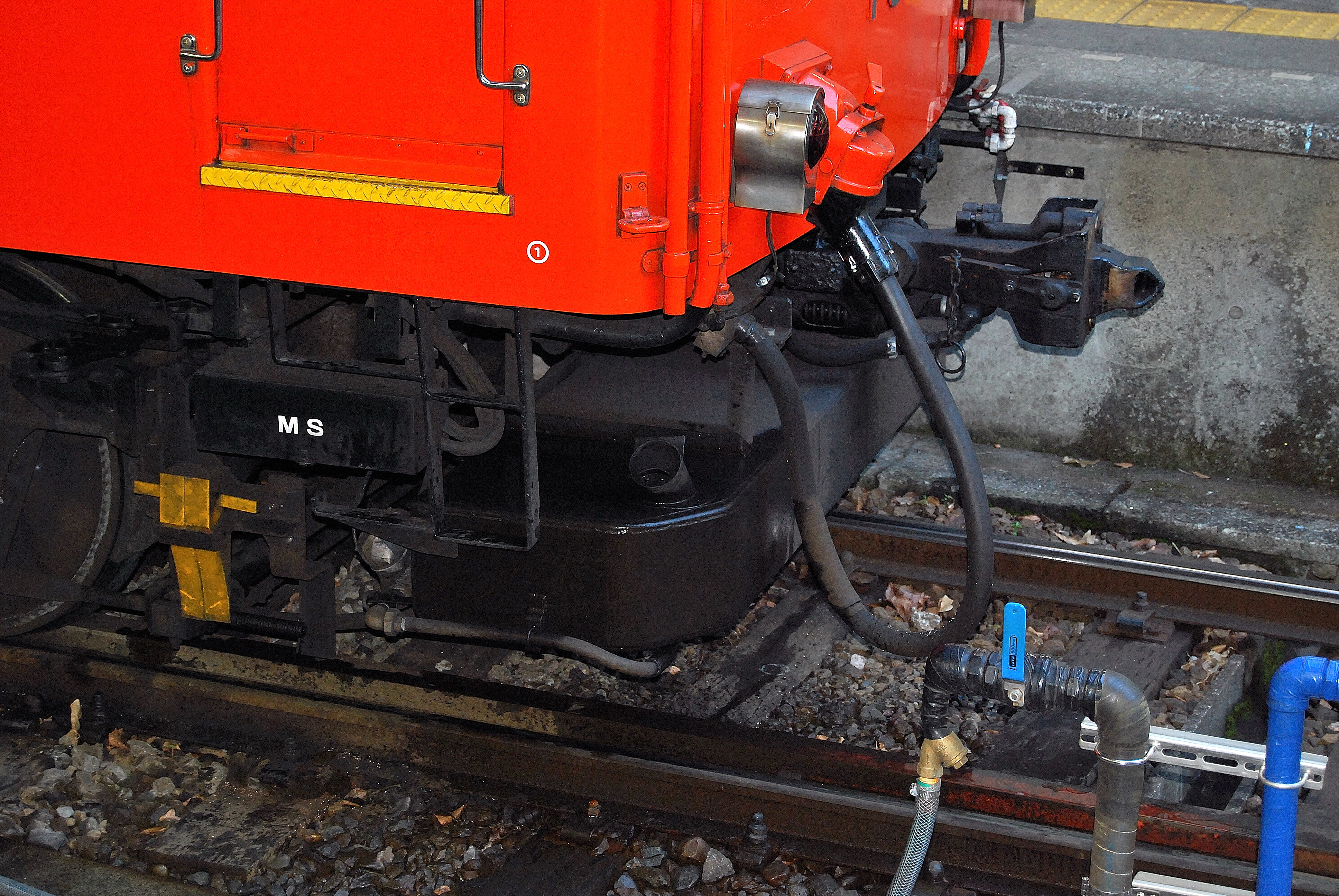 モハ２形109号の車両の両端の運転室直下にある360Lの水タンク、急カーブでの走行時に車輪の踏面にあるフランジの磨耗を防ぐために水を車輪の踏面に散水するフランジ磨耗防止散水装置の水のタンクである、なお右側の線路の隣に設置されているバルブと配管類は水をタンクに入れる為の給水設備である。（ホームから撮影）